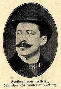 Clemens August Freiherr von Ketteler, deutscher Gesandter in Peking 1899/1900